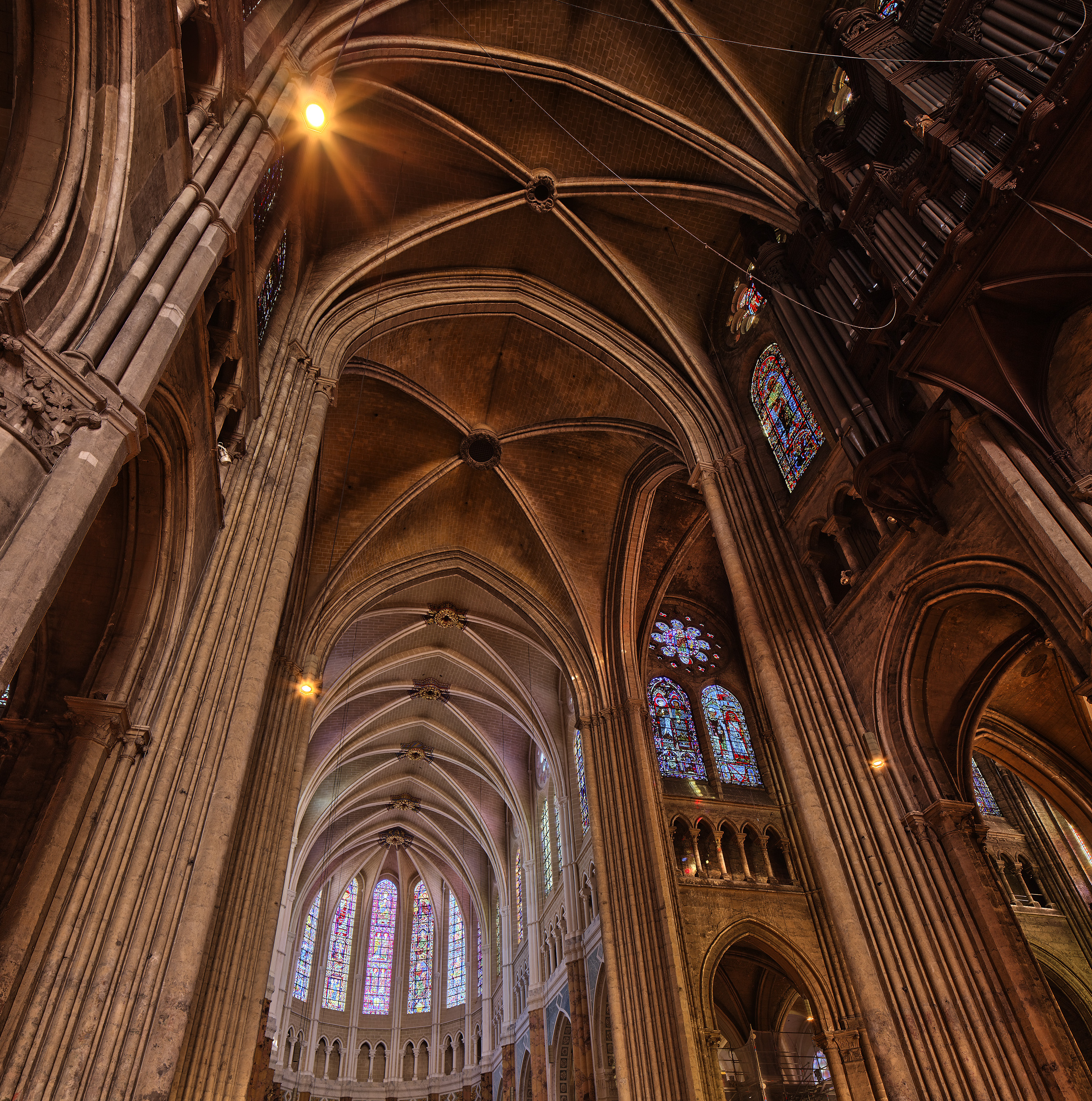 Cathédrale Notre-Dame de Chartres. Nef et Choeur. Orgue et Vitraux.